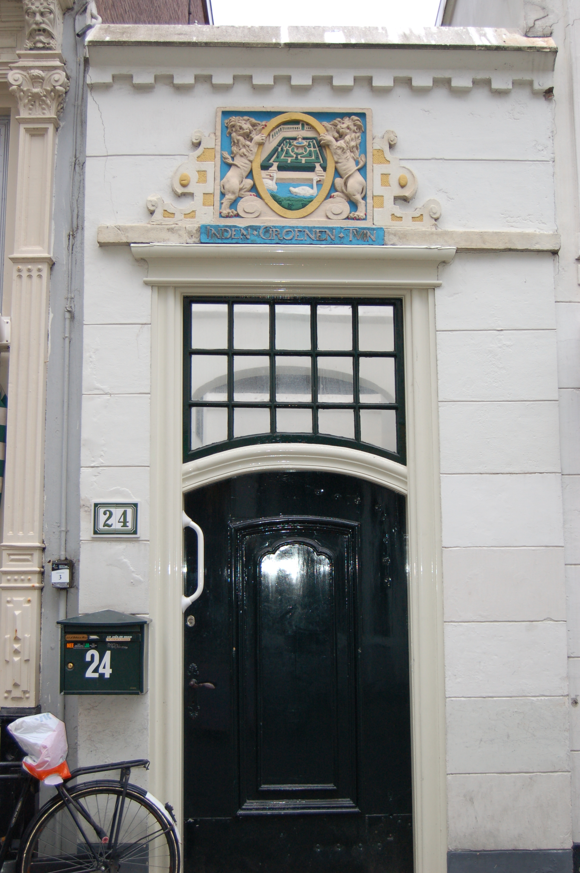 Hofje 'In de Groene Tuin' (The Green Garden) in Haarlem, Netherlands